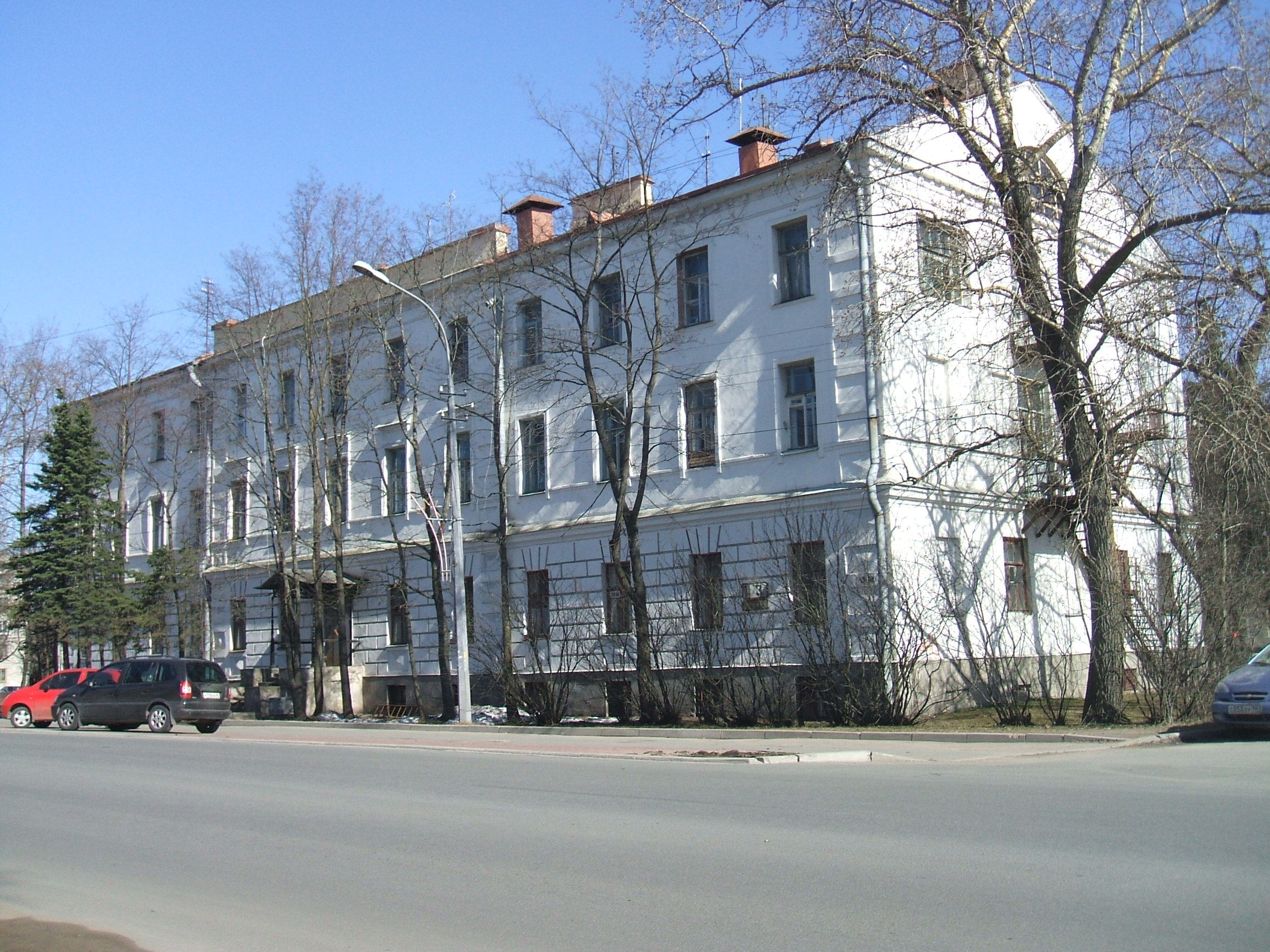 Бывший банк до 1917 года, затм офицерский дом на площади Свободы в Сестрорецке Санкт-Петербурга